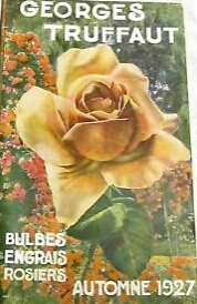 Catalogue Georges Truffaut automne 1927.